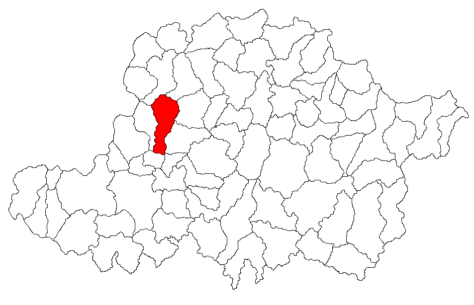 Categorie:Hărţi ale judeţului Arad